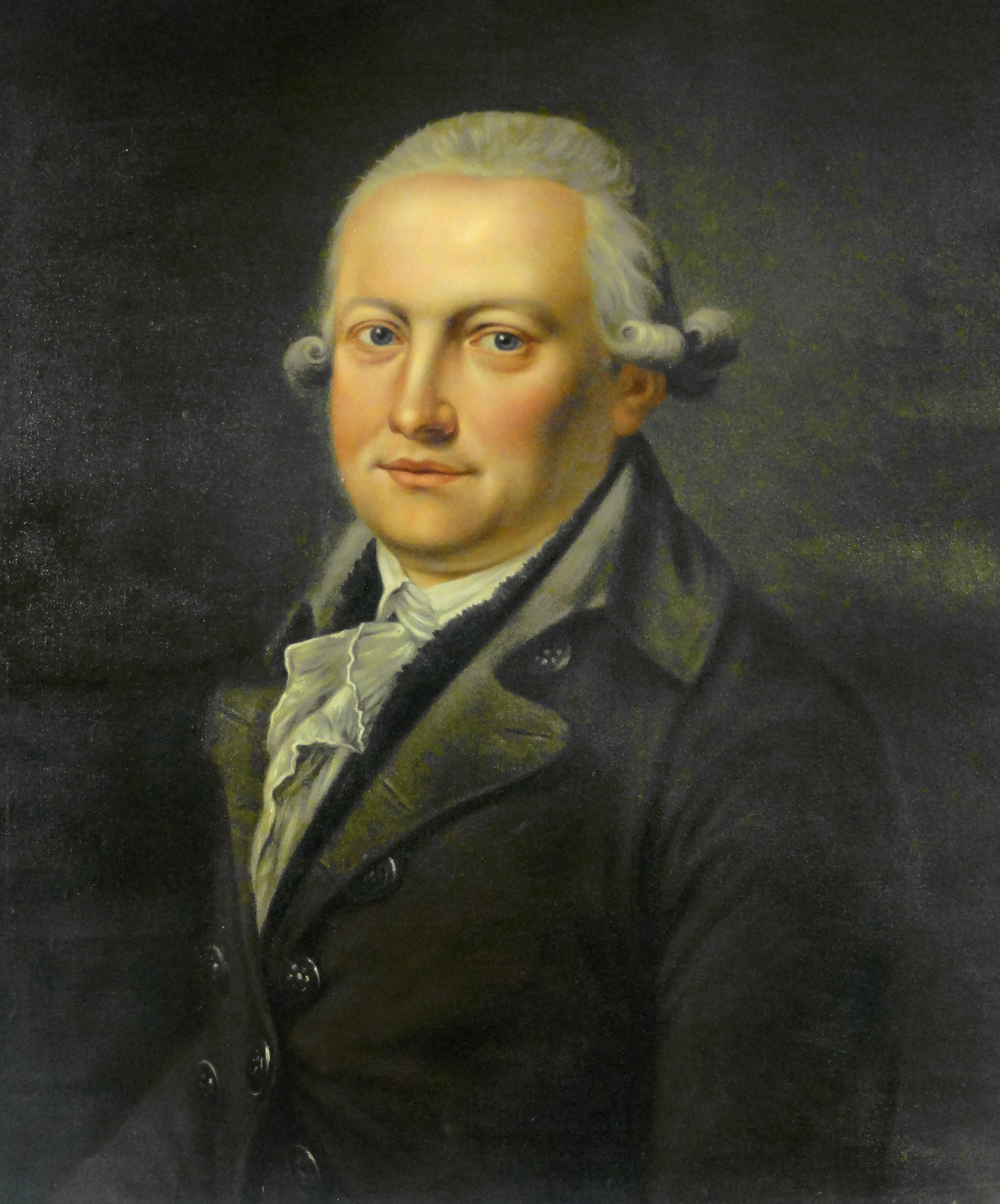 Karl Theodor von Traitteur, Porträt aus dem Familienbesitz, Jahr und Maler unbekannt